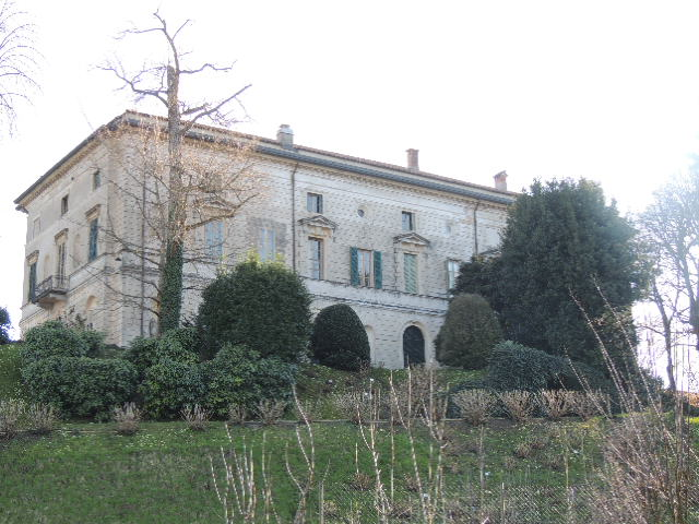 facciata dal primo anello